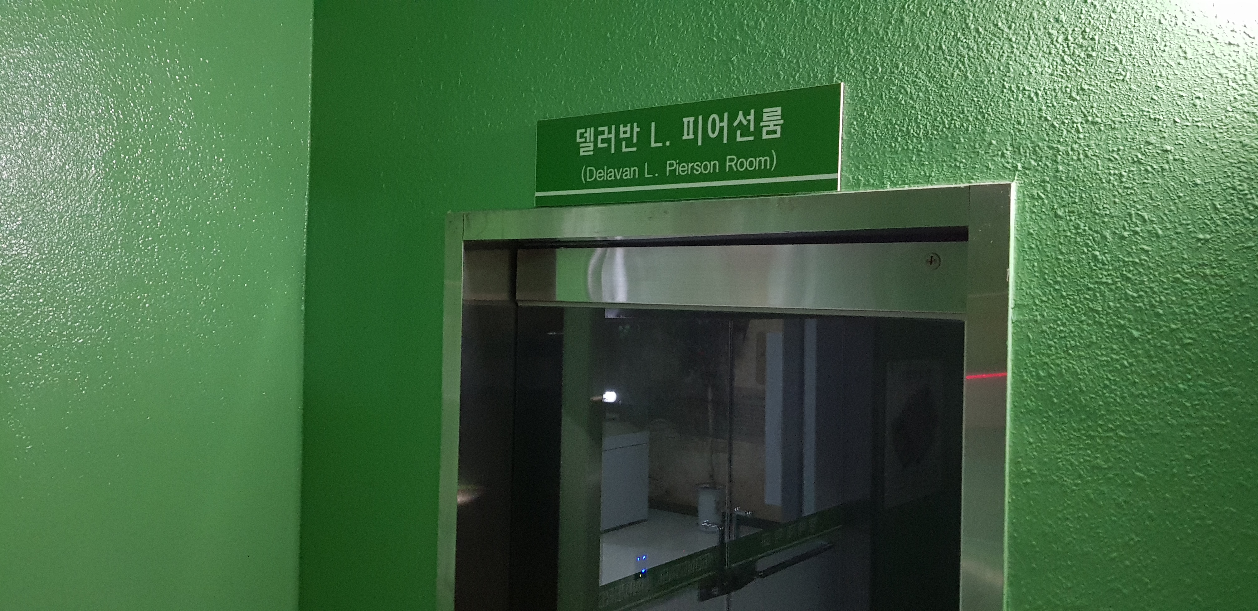 델리반 피어선 룸 (피어선기념관)